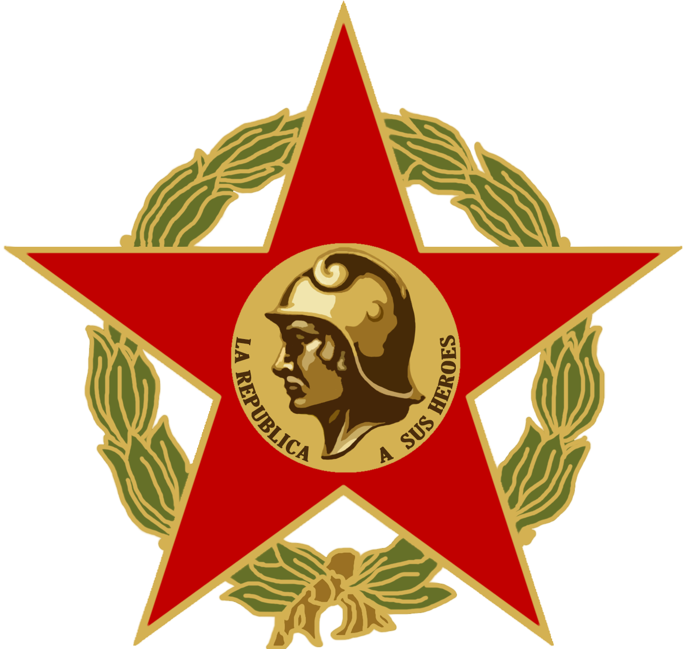 Diseño creado mediante programa Adobe Photoshop CS6